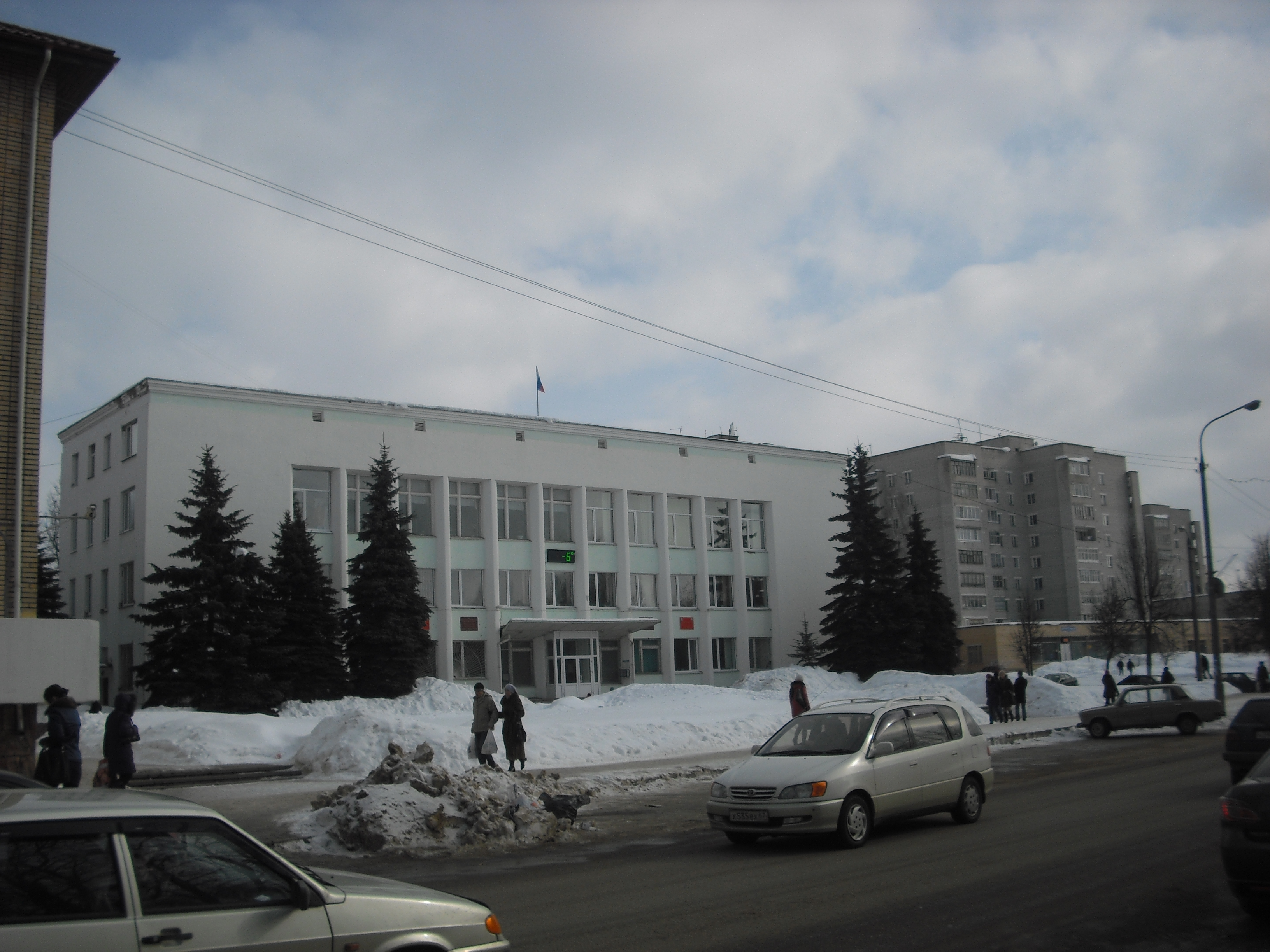 Здание районной администрации в Вязьме